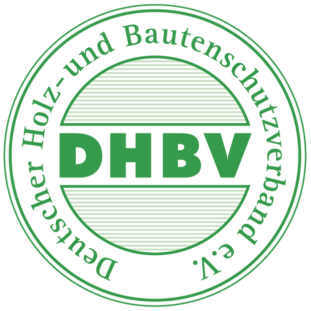 Verbandslogo des Deutschen Holz- und Bautenschutzverbandes e.V.